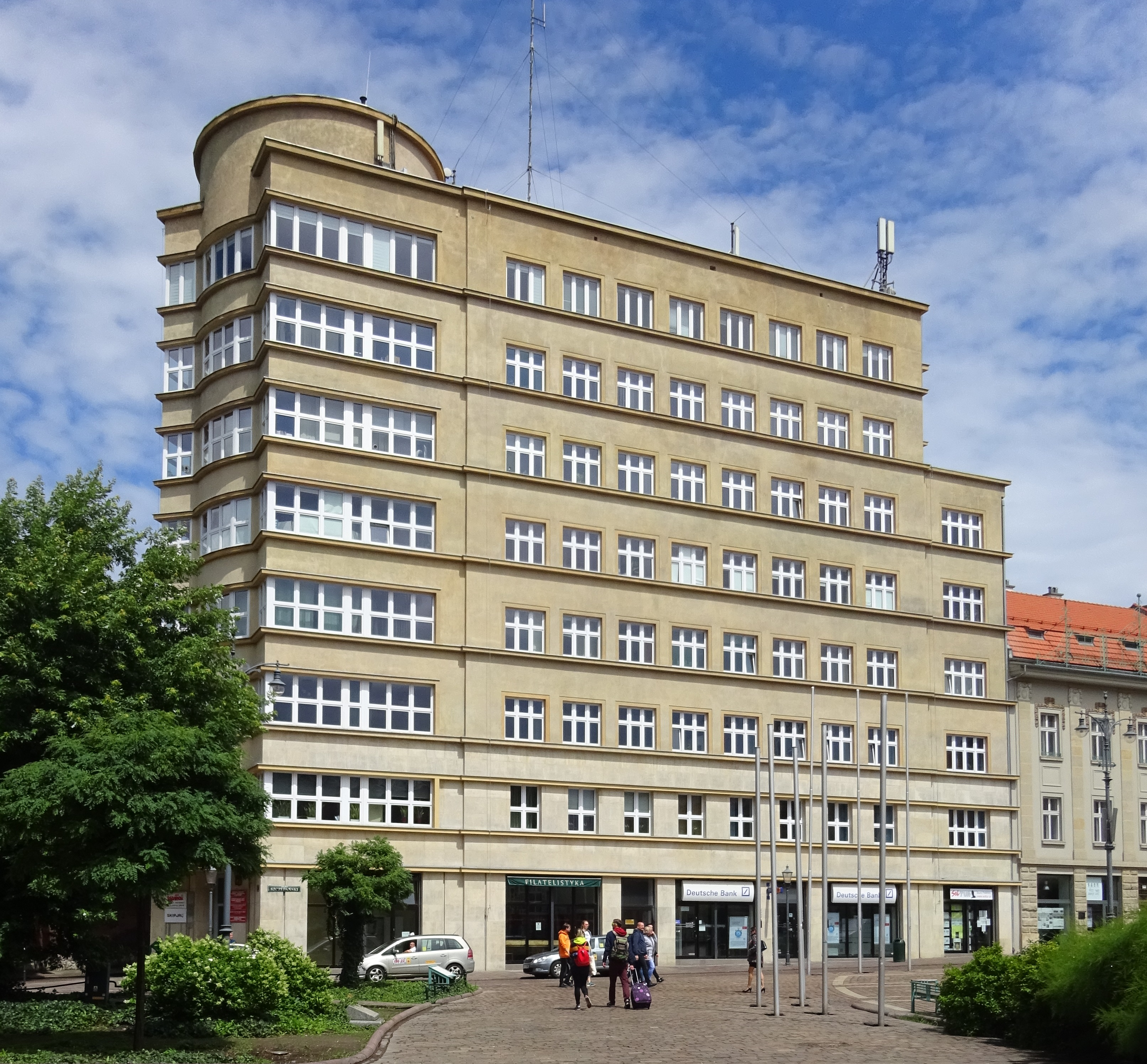 Budynek Komunalnej Kasy Oszczędnościowej w Krakowie przy Placu Szczepańskim. Po remoncie - 2018.